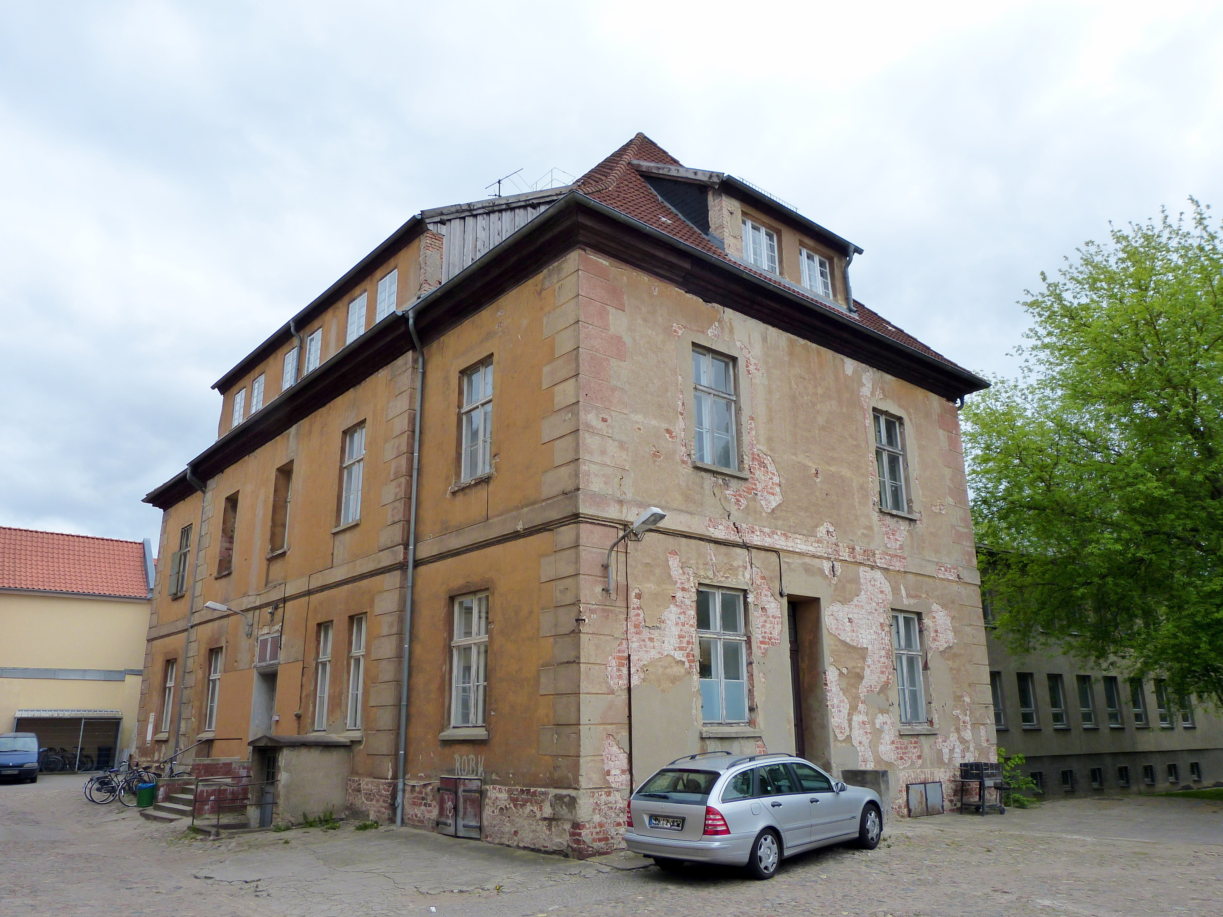 Greifswald, Domstraße 20a, ehemaliges Hofgericht, 1709 errichtet